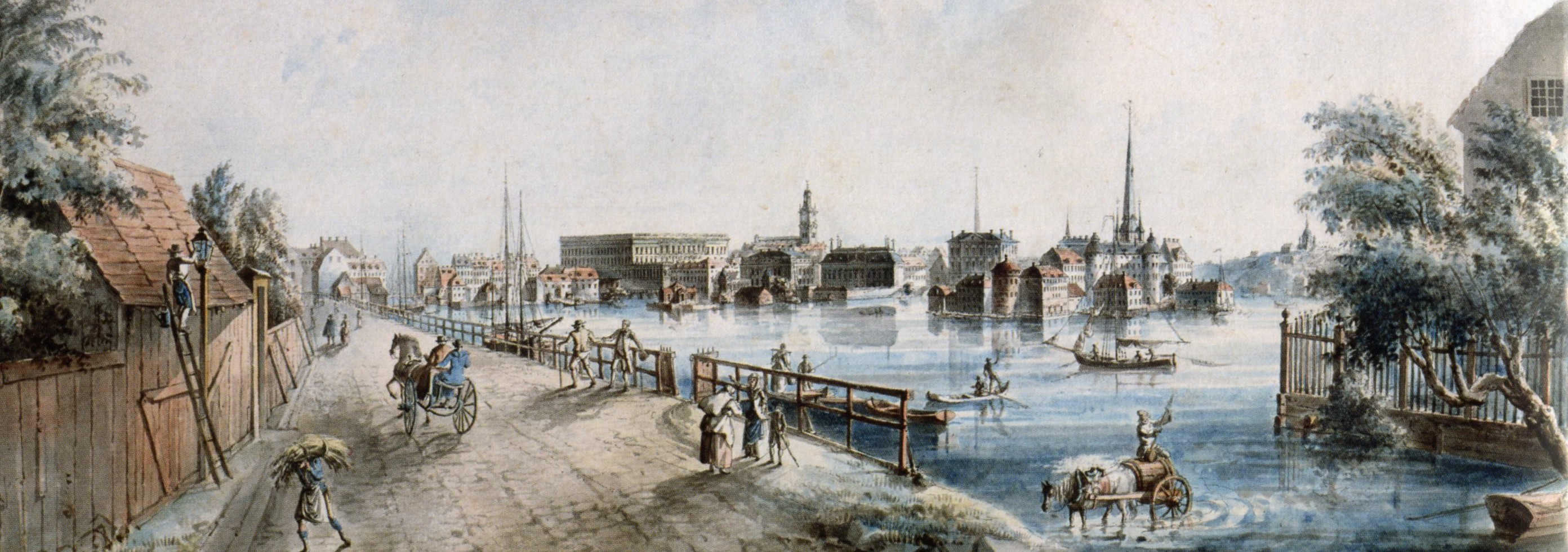 Vy från Kungsholmen över Stockholm med nya Kungsholmsbron (bilden är beskuren)